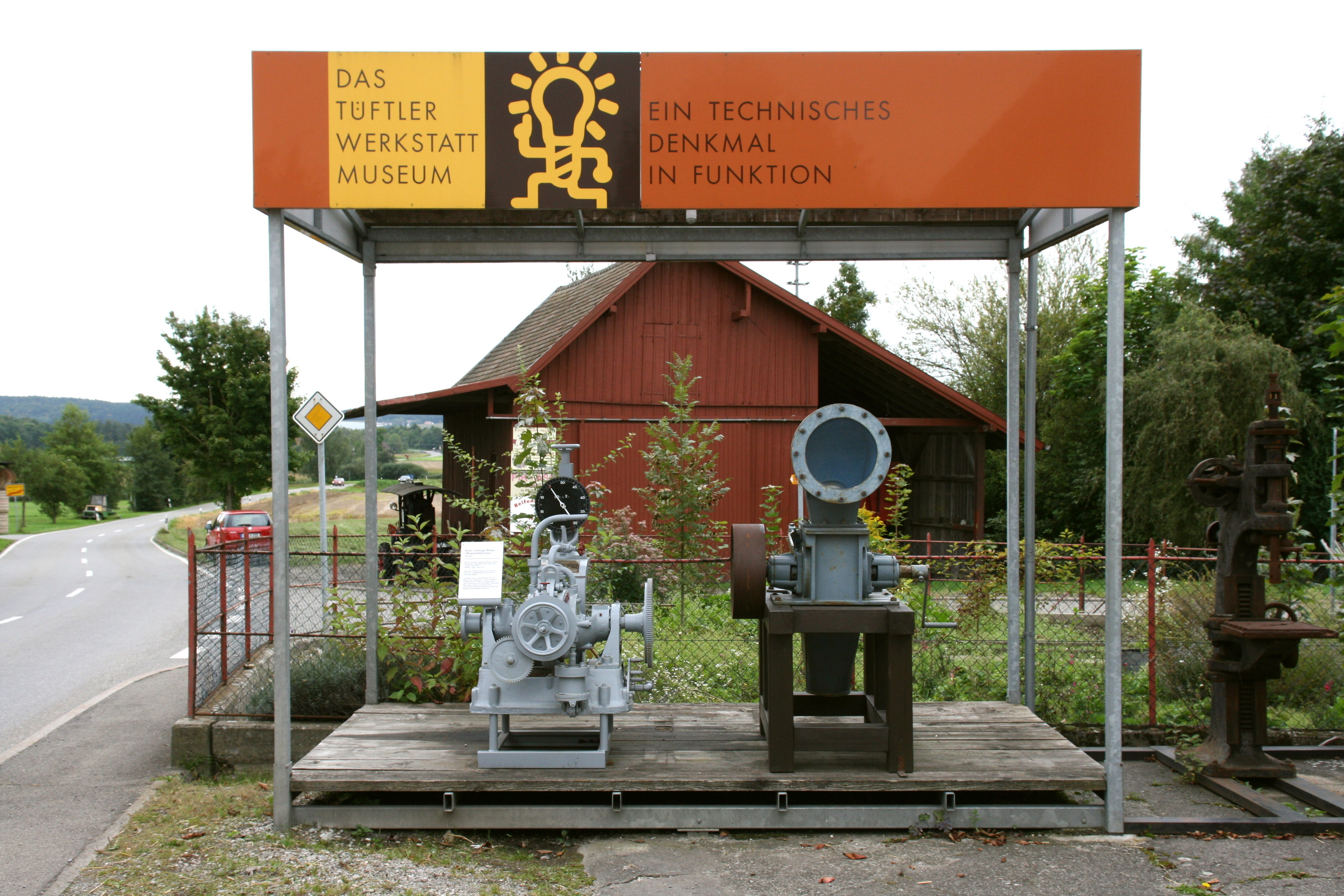 Hauptstraße in Altheim, Frickingen